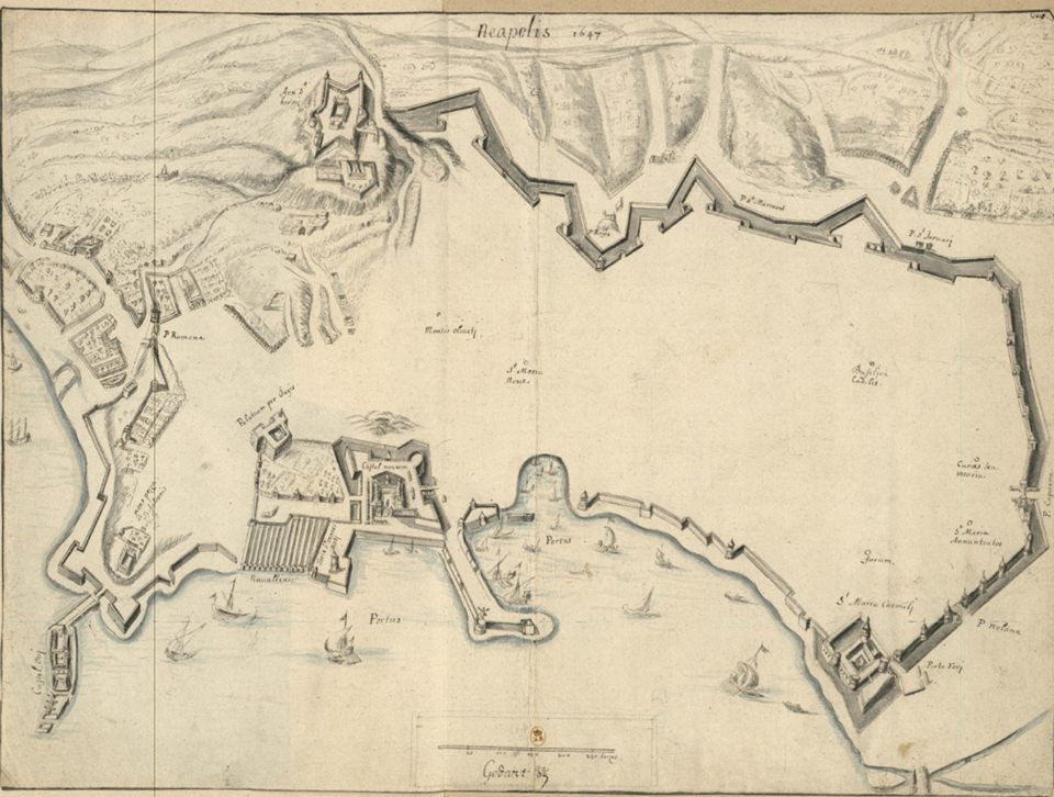 Pianta delle mura difensive della città di Napoli. Disegno di Godart (1647).